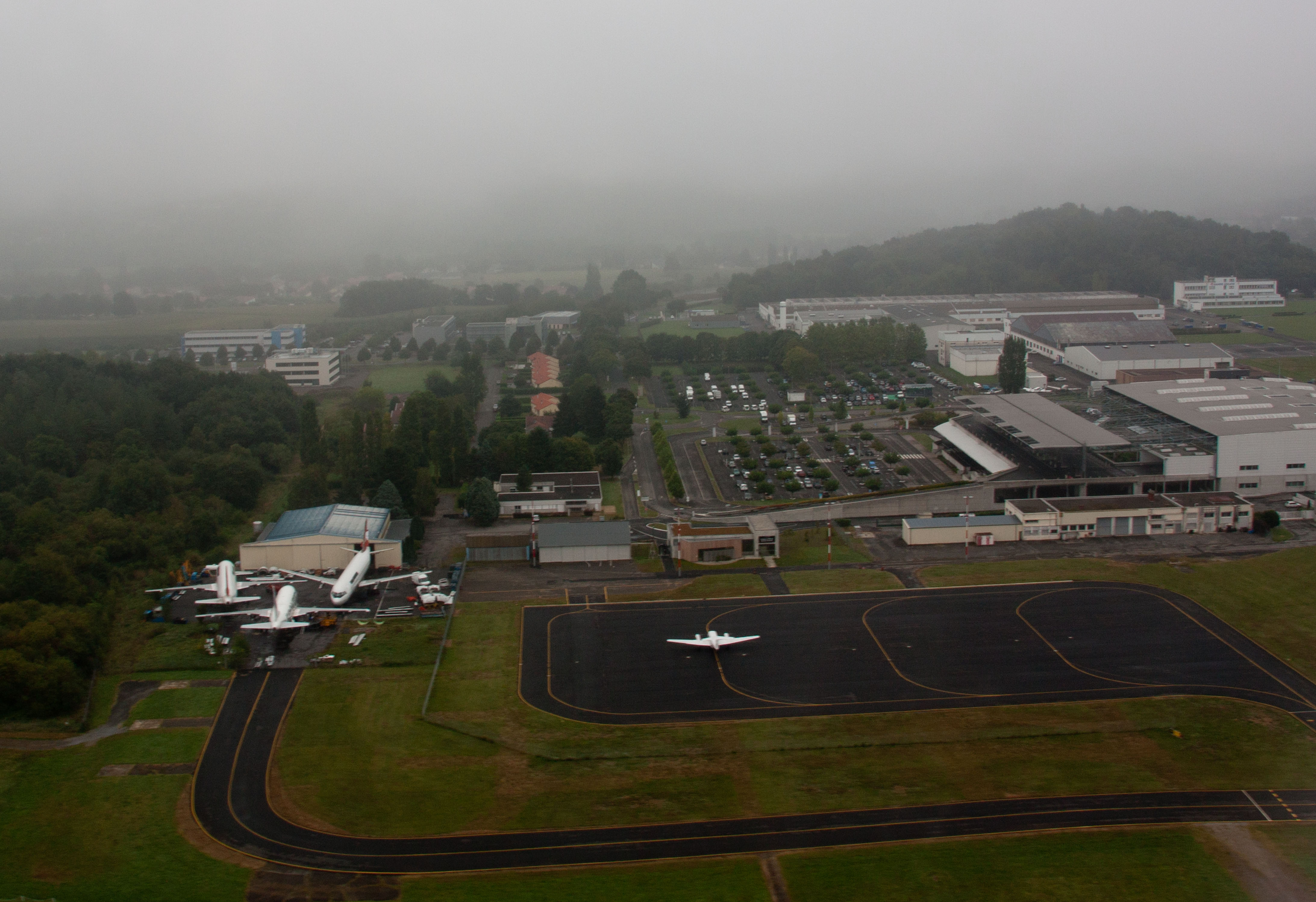 Aéroport de Tarbes-Lourdes-Pyrénées - vue de l'aérogare, du tarmac et des pistes